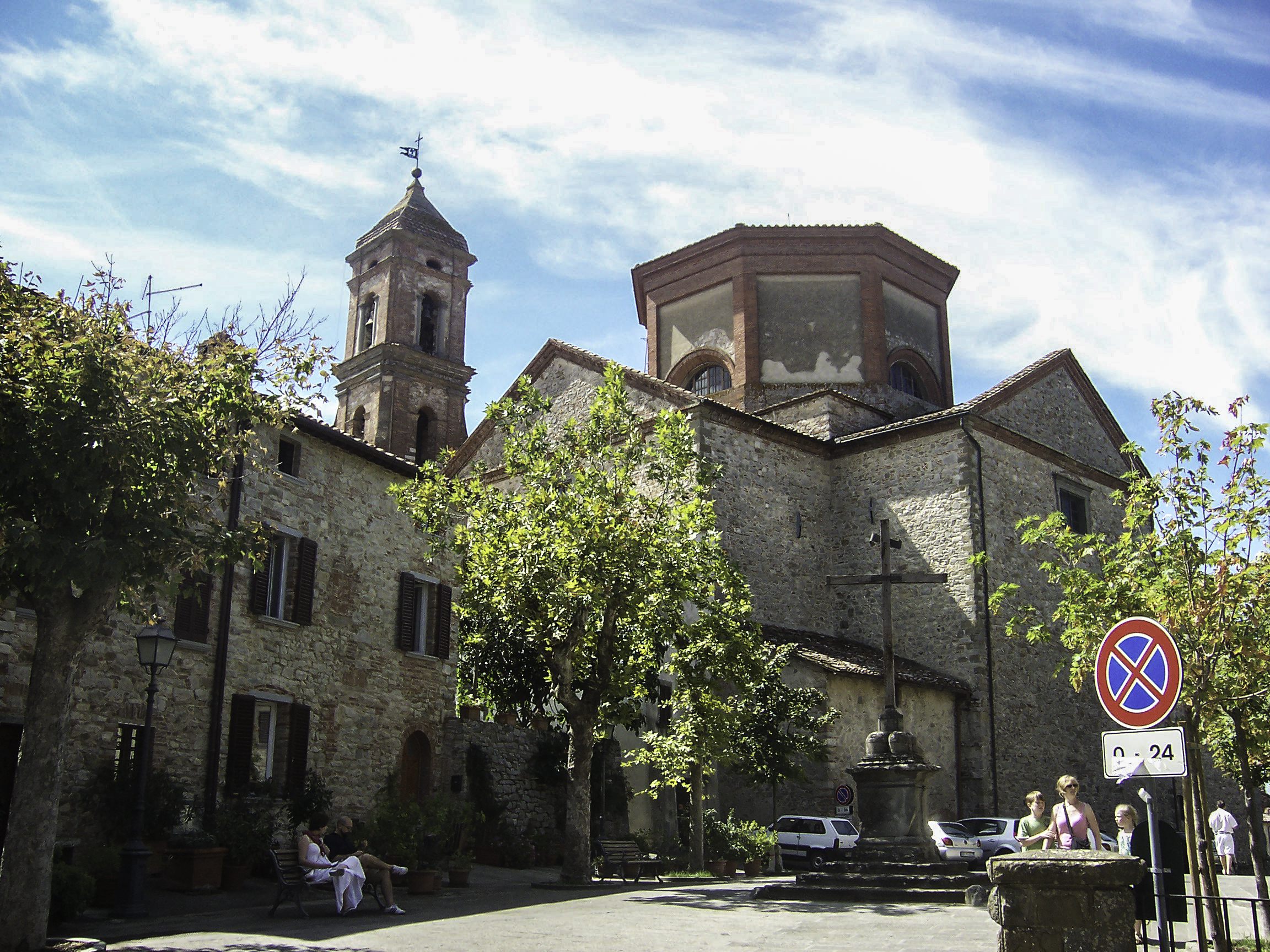 Chiesa e complesso di San Michele This is a photo of a monument which is part of cultural heritage of Italy.